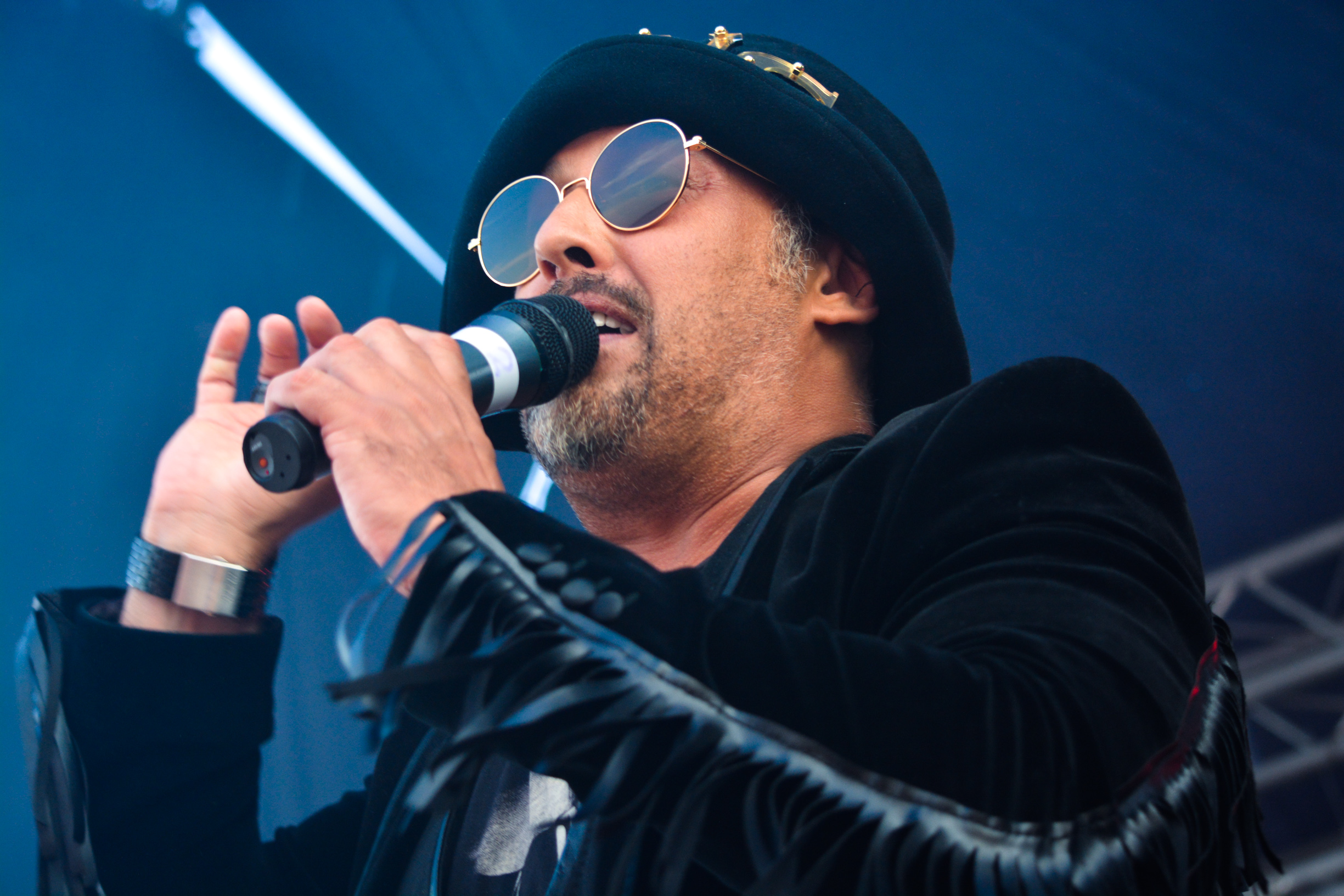 Дима Коляденко на фестивале «Paradise Holiday 2015».